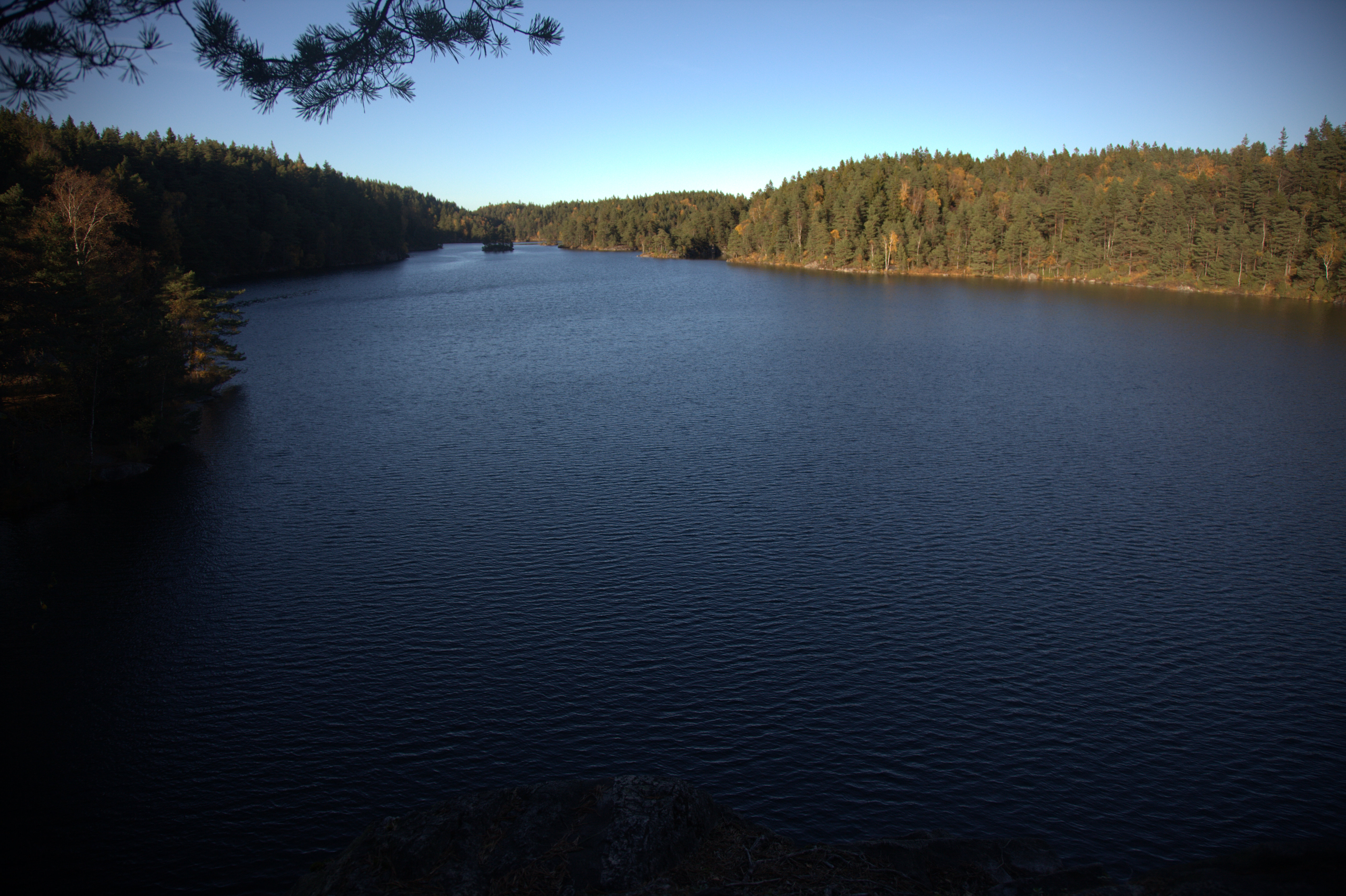 Härsvatten i Stenungsunds kommun